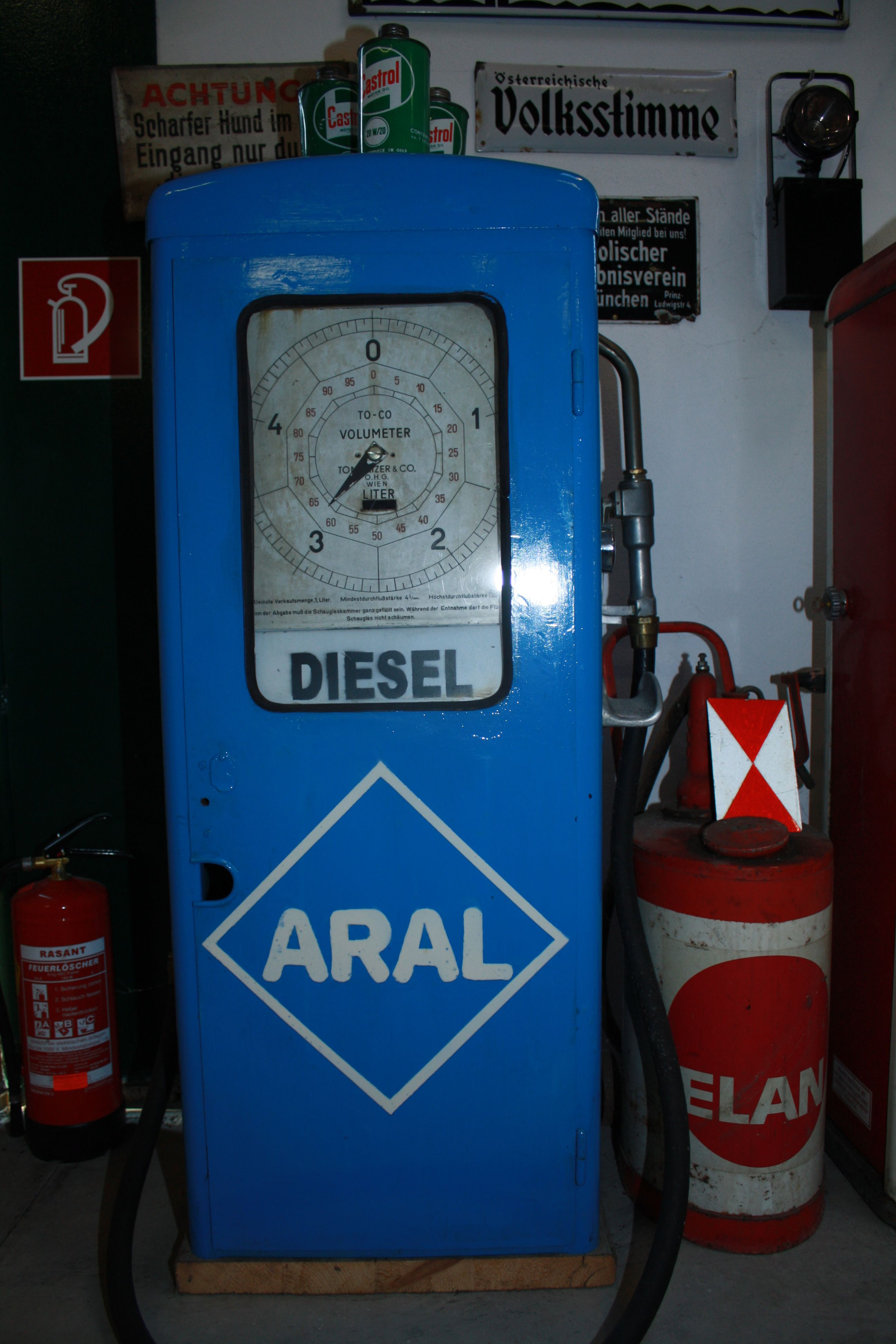 Dieselzapfsäule von 1958 im Traktormuseum Traktorium in Drasenhofen in Niederösterreich